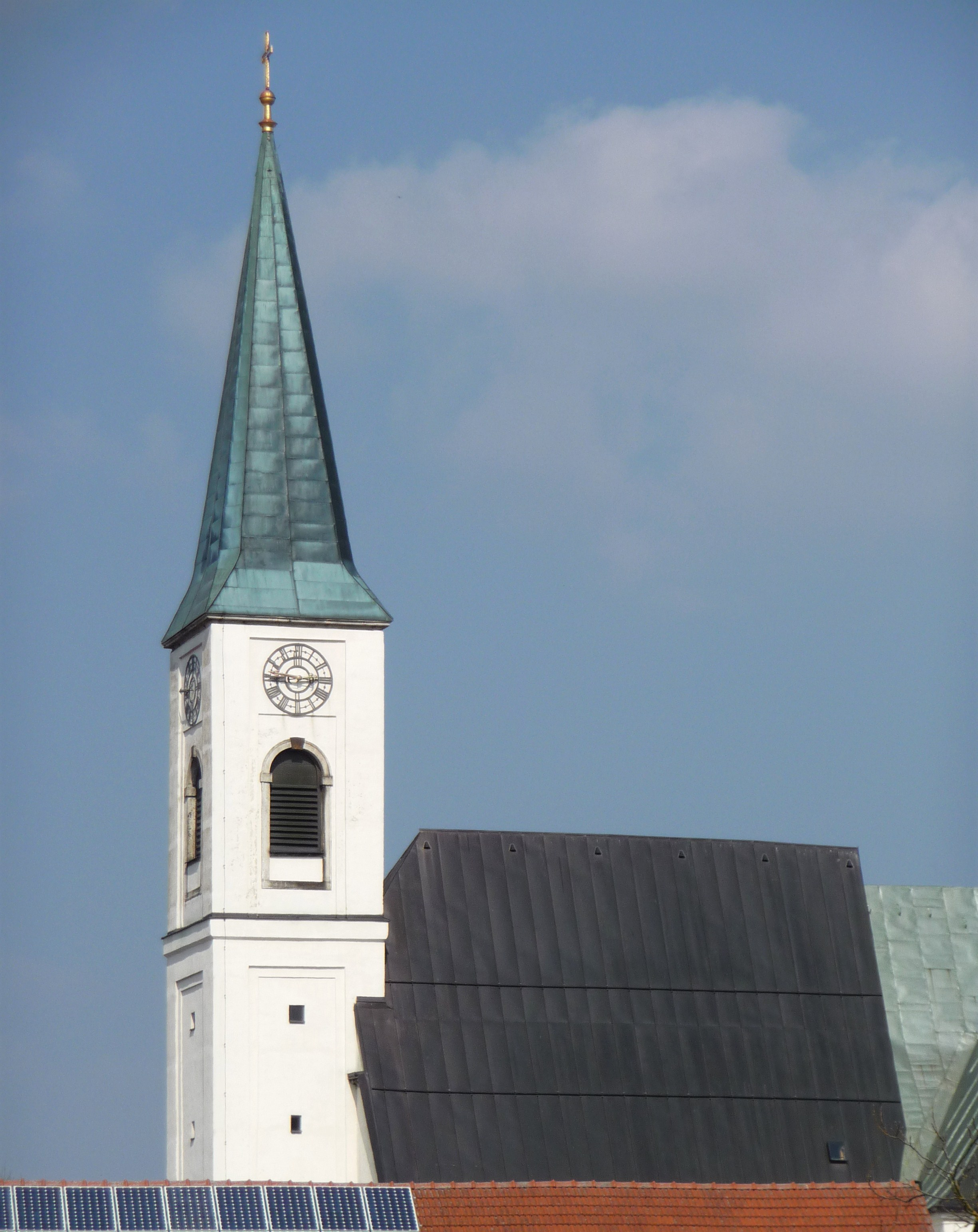 Die Pfarrkirche St. Jakobus der Ältere in Gottsdorf